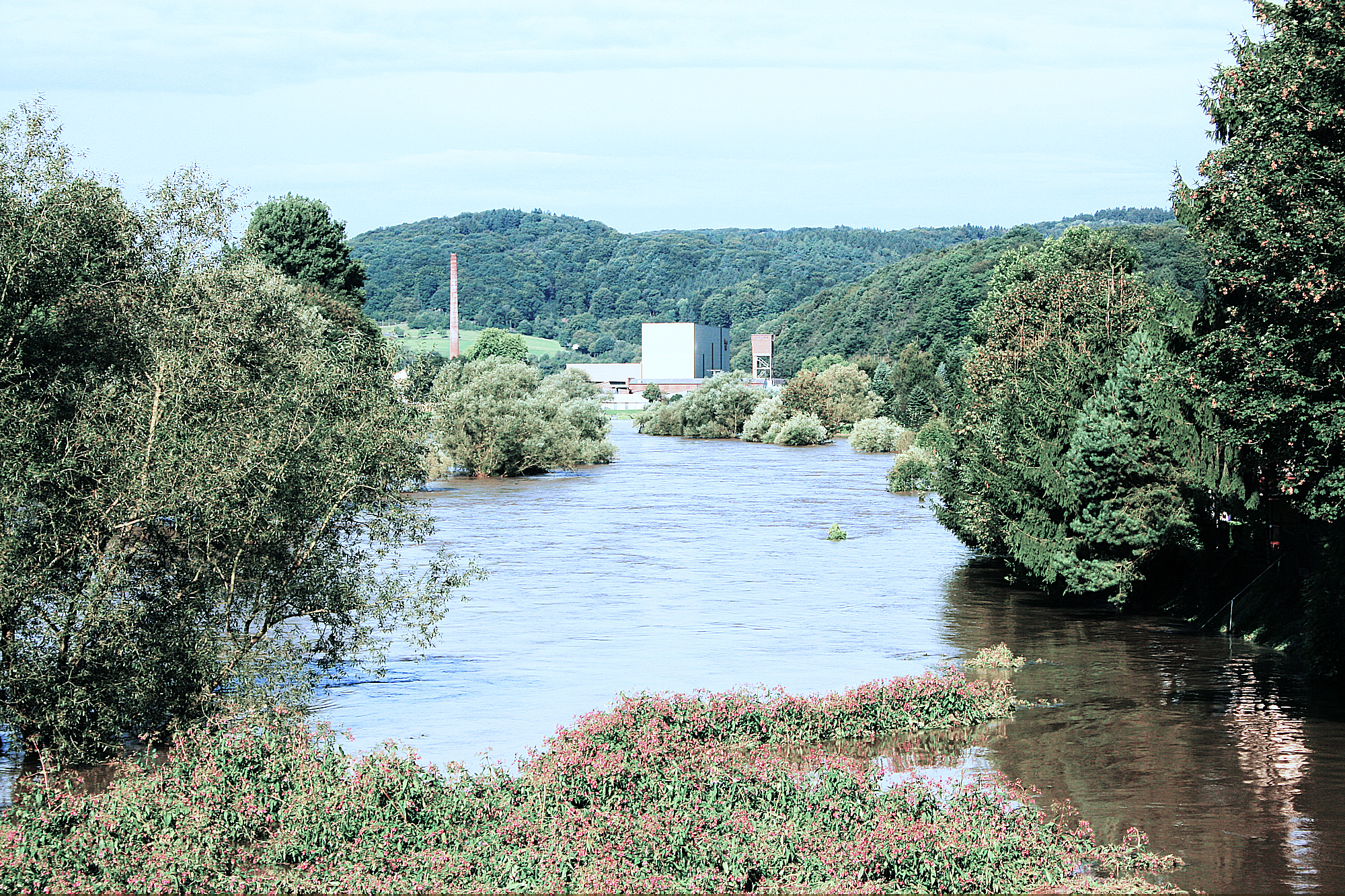 Eitorf, Sieg und Schoeller AG